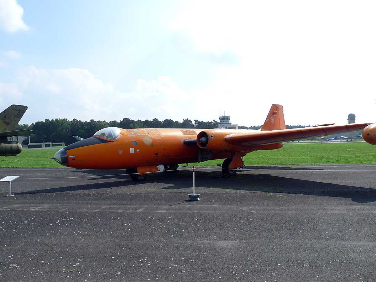 BAC Canberra